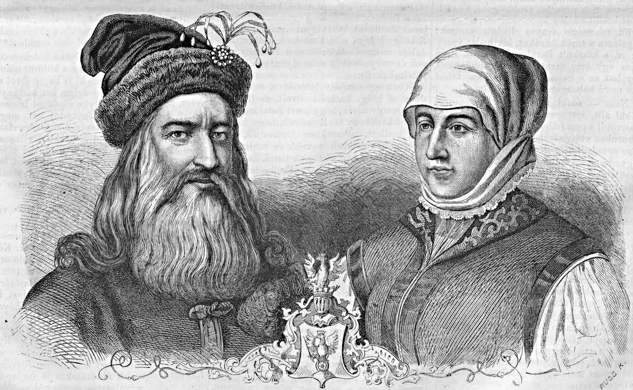 Fürst Georg I. mit seiner Ehegattin im etwas fortgeschrittenen Alter; in der Mitte ist das Familienwappen der Rákóczi's zu sehen.